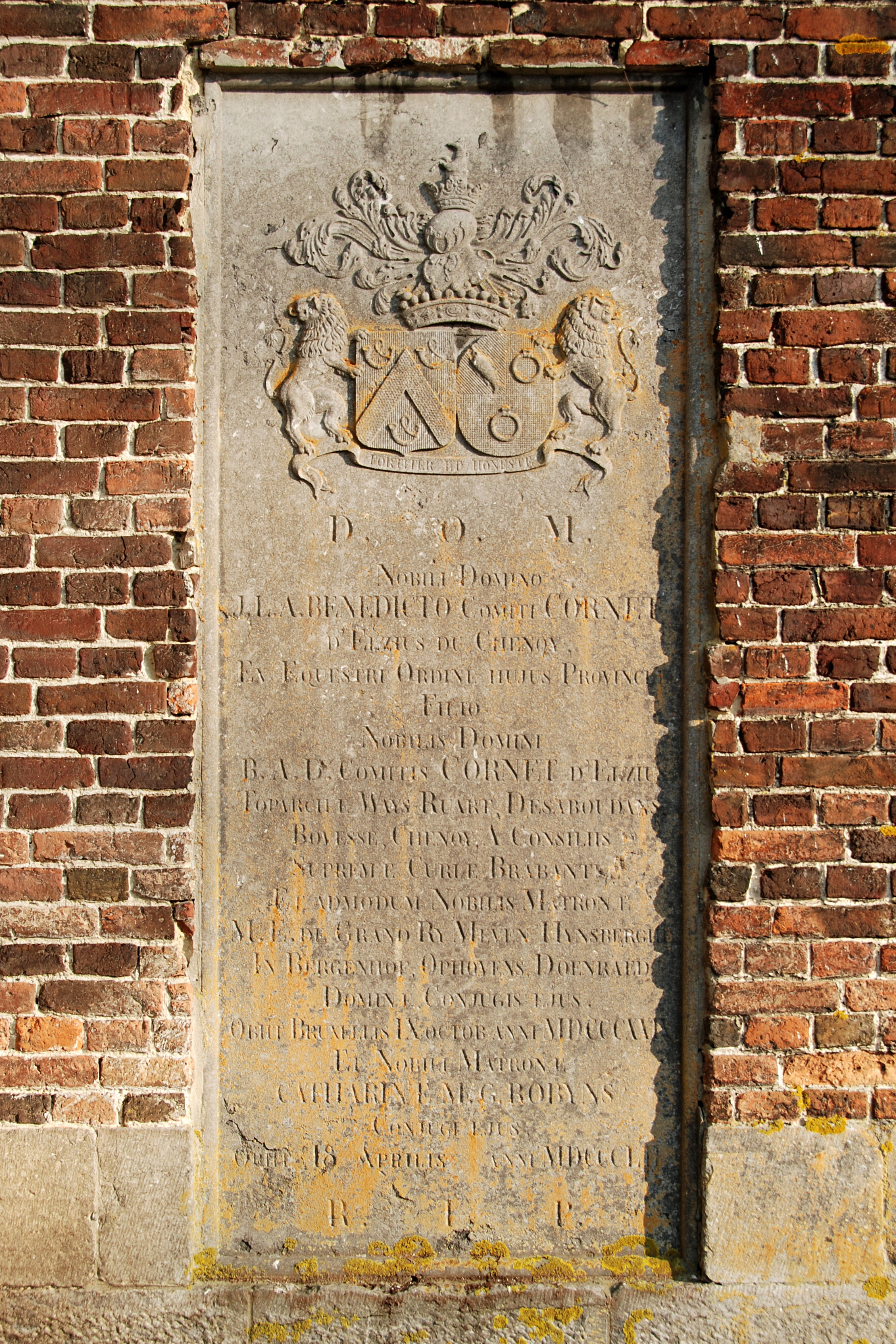 Belgique - Brabant wallon - Église Saint-Martin de Ways - Dalle funéraire du comte Cornet d'Elzius